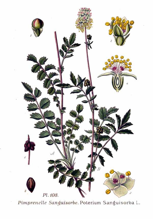 Sanguisorba minor var. minor, syn. Poterium sanguisorba L.